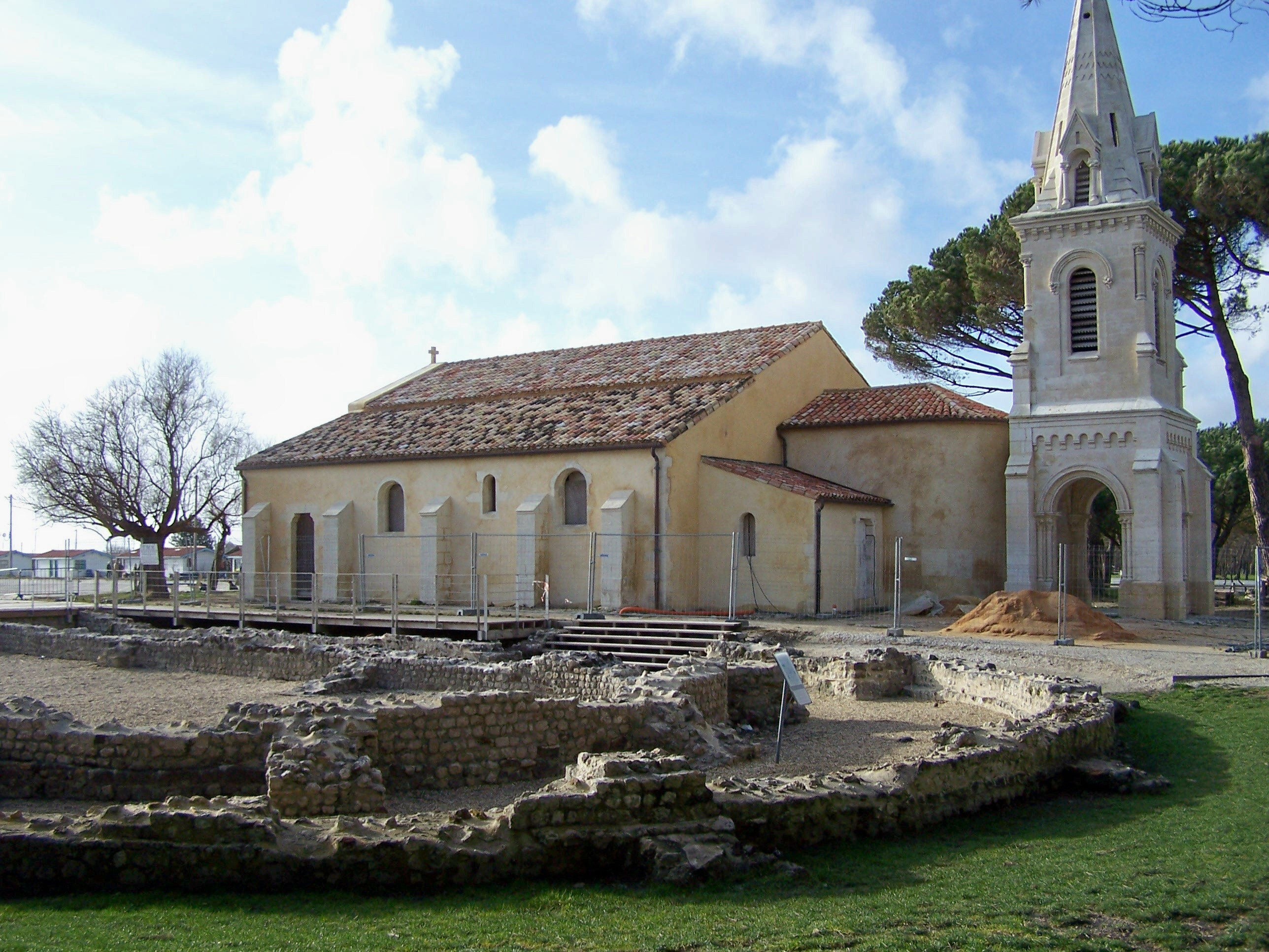 Église Saint Éloi et vestiges gallo-romains à Andernos-les-Bains, Gironde, France